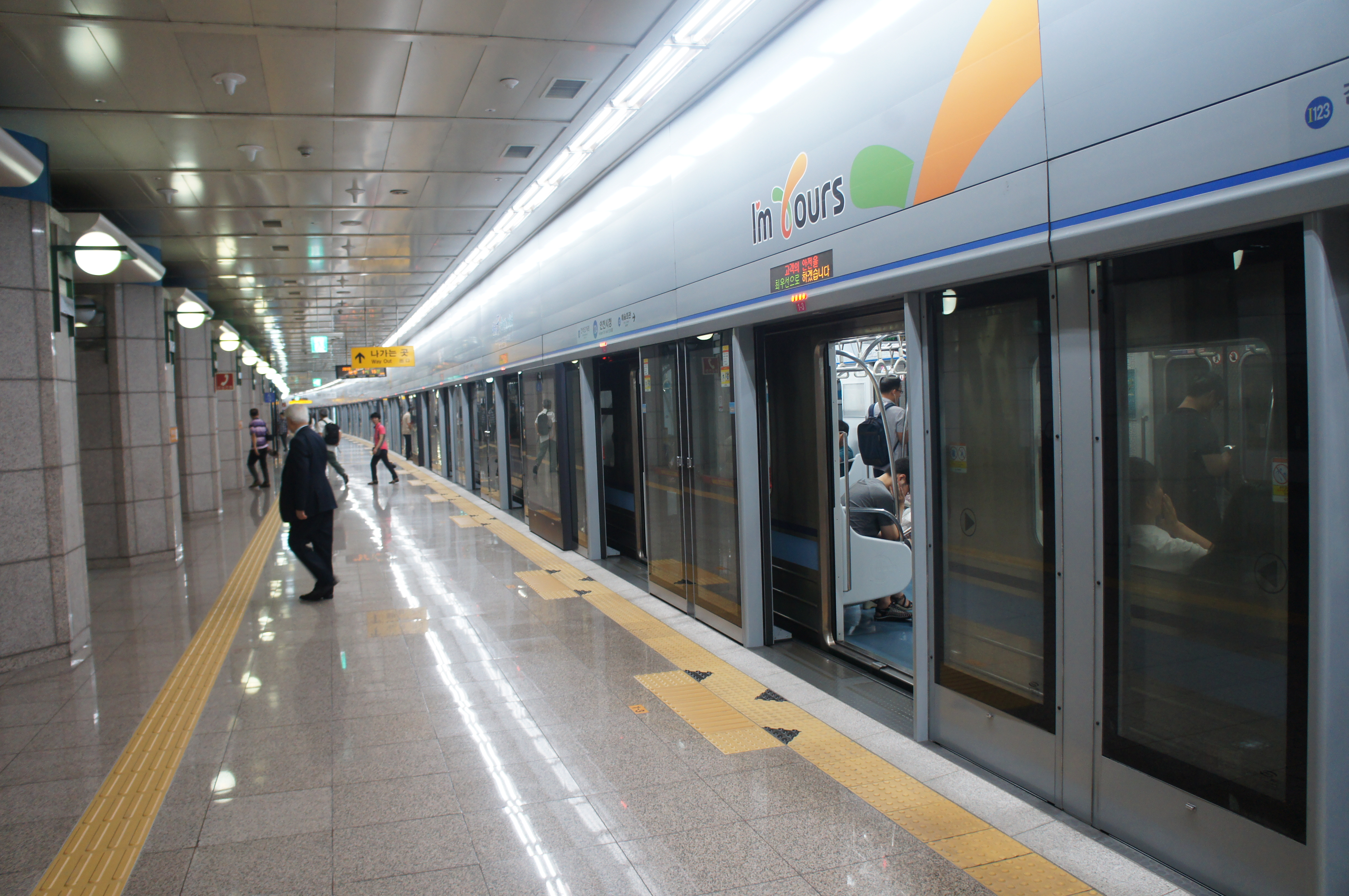 인천1호선 인천시청역 승강장